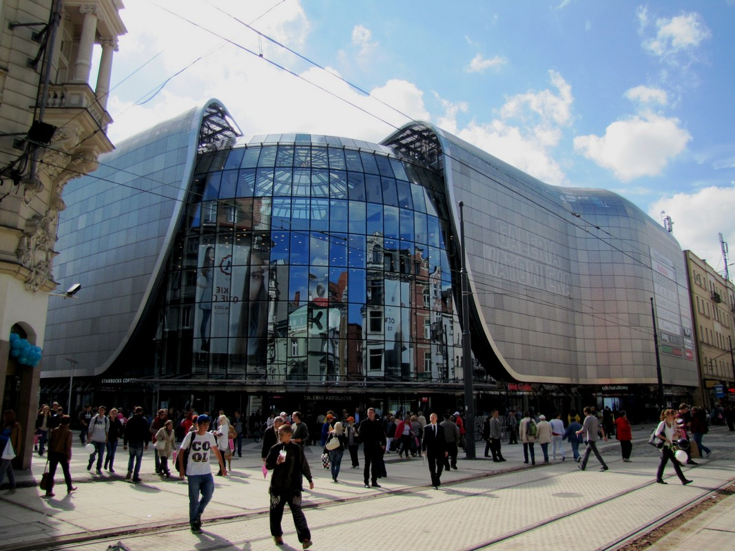 PKP. GALERIA KATOWICKA.